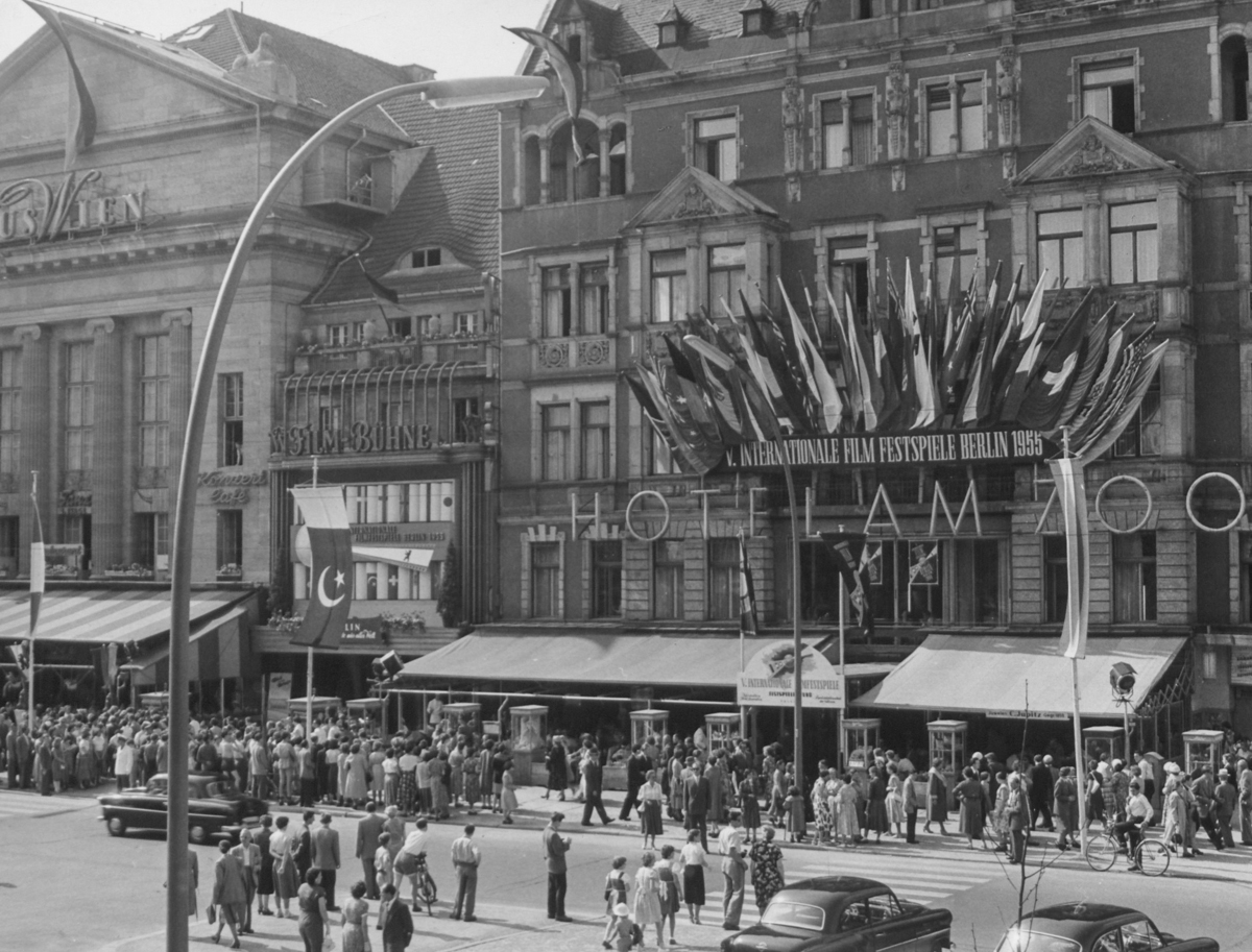 Fotografie aus der Sammlung der Stiftung Stadtmuseum Berlin Fotograf: Harry Croner Titel: IFF 1955. Kurfürstendamm